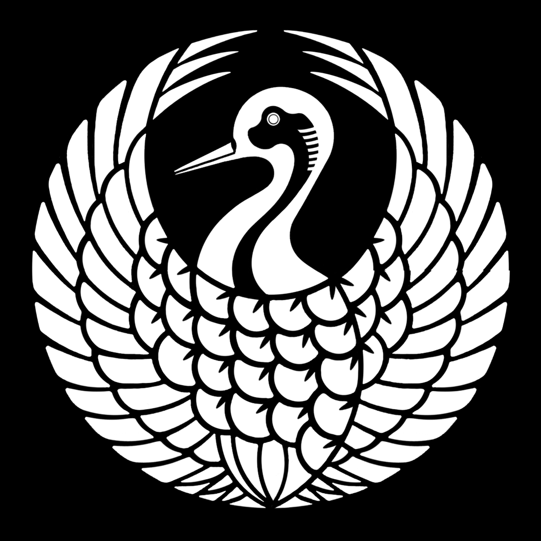 「鶴の丸」紋（染抜）